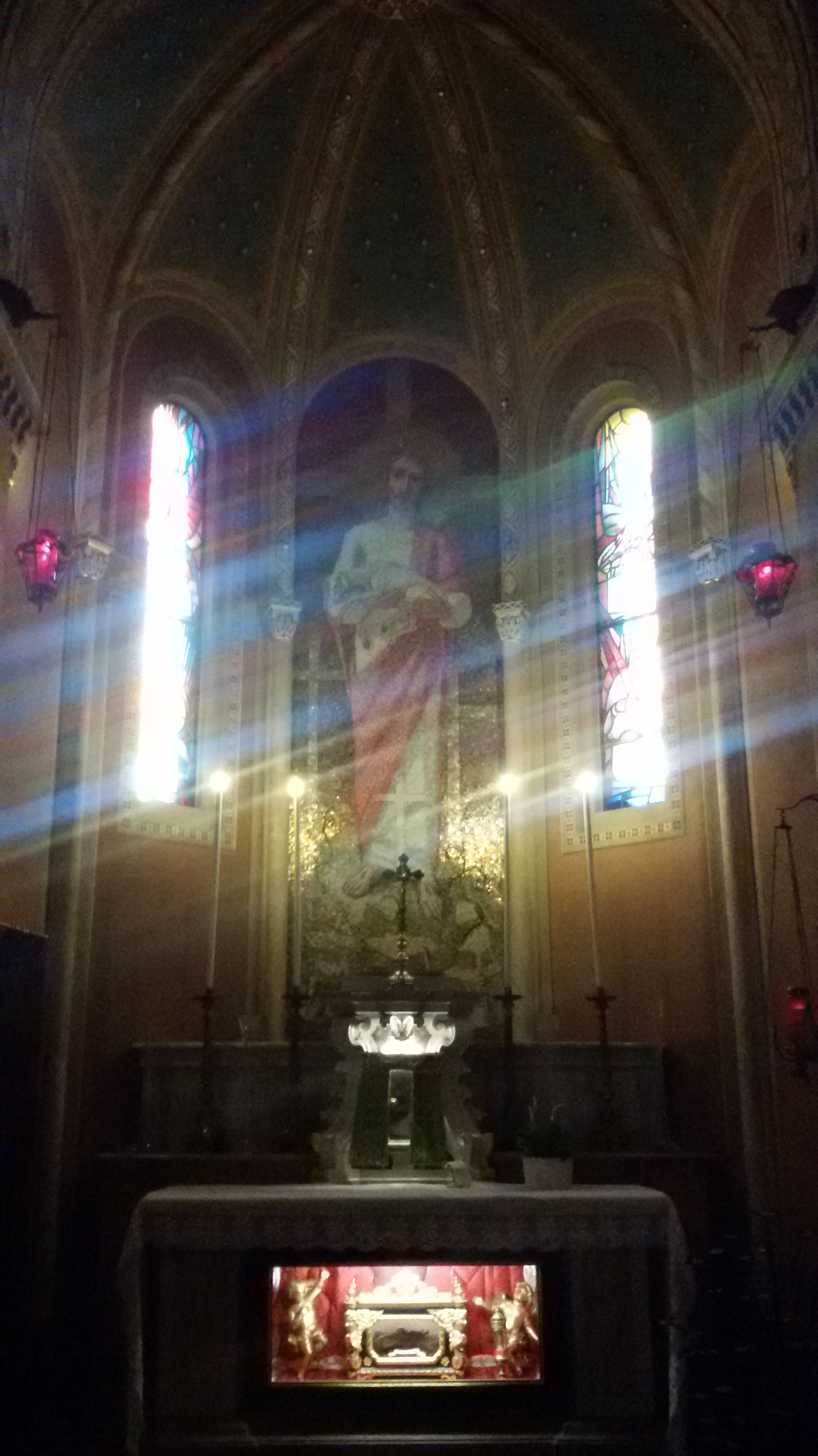 Chiesa di Santa Cristina Quinto di Treviso